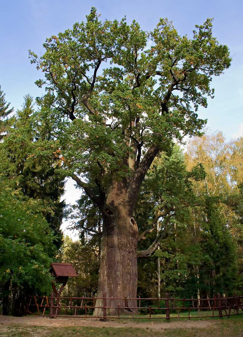 Dąb Chrobry.